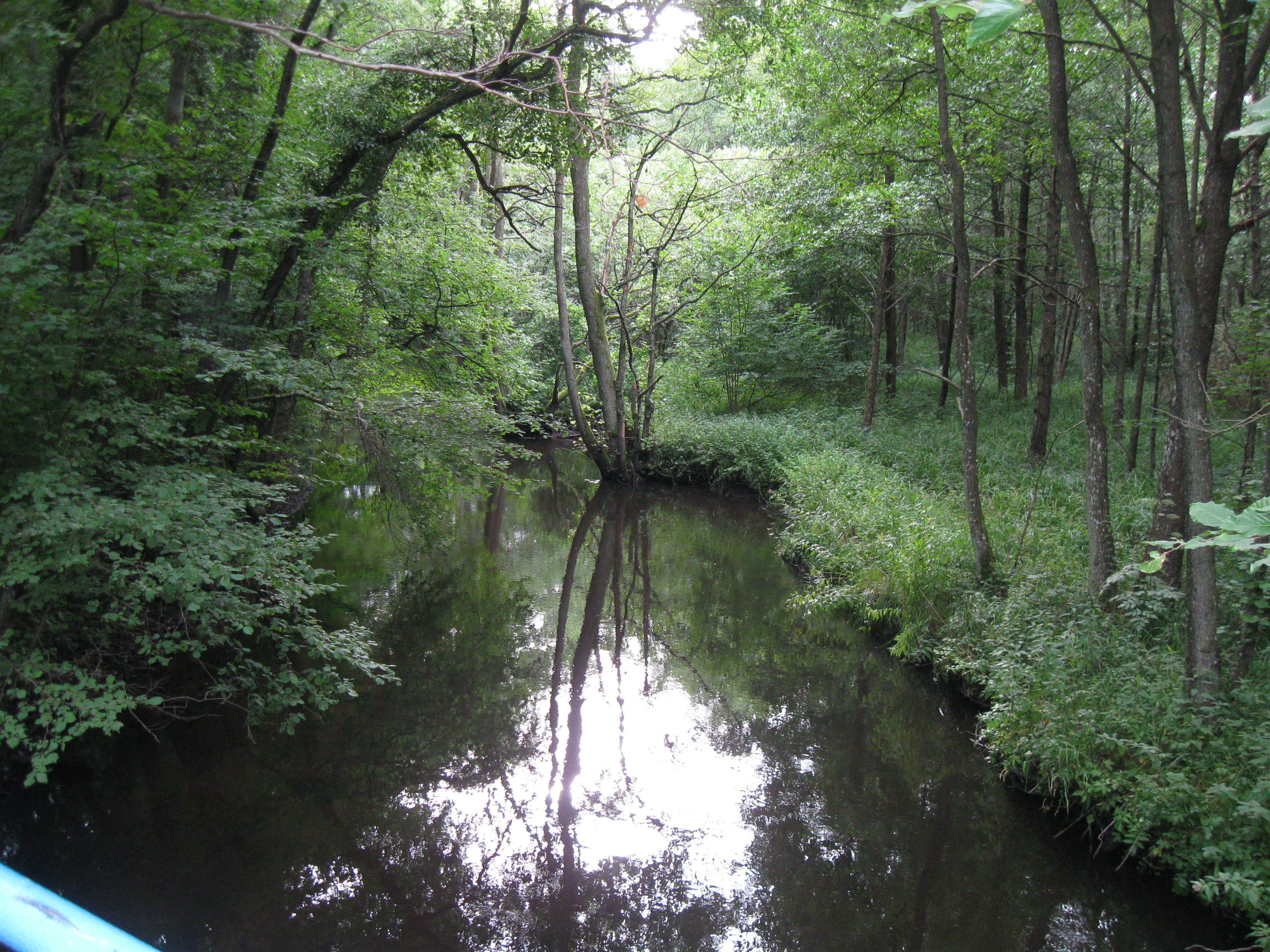 Rzeka Mołstowa między Grądem a Starninem